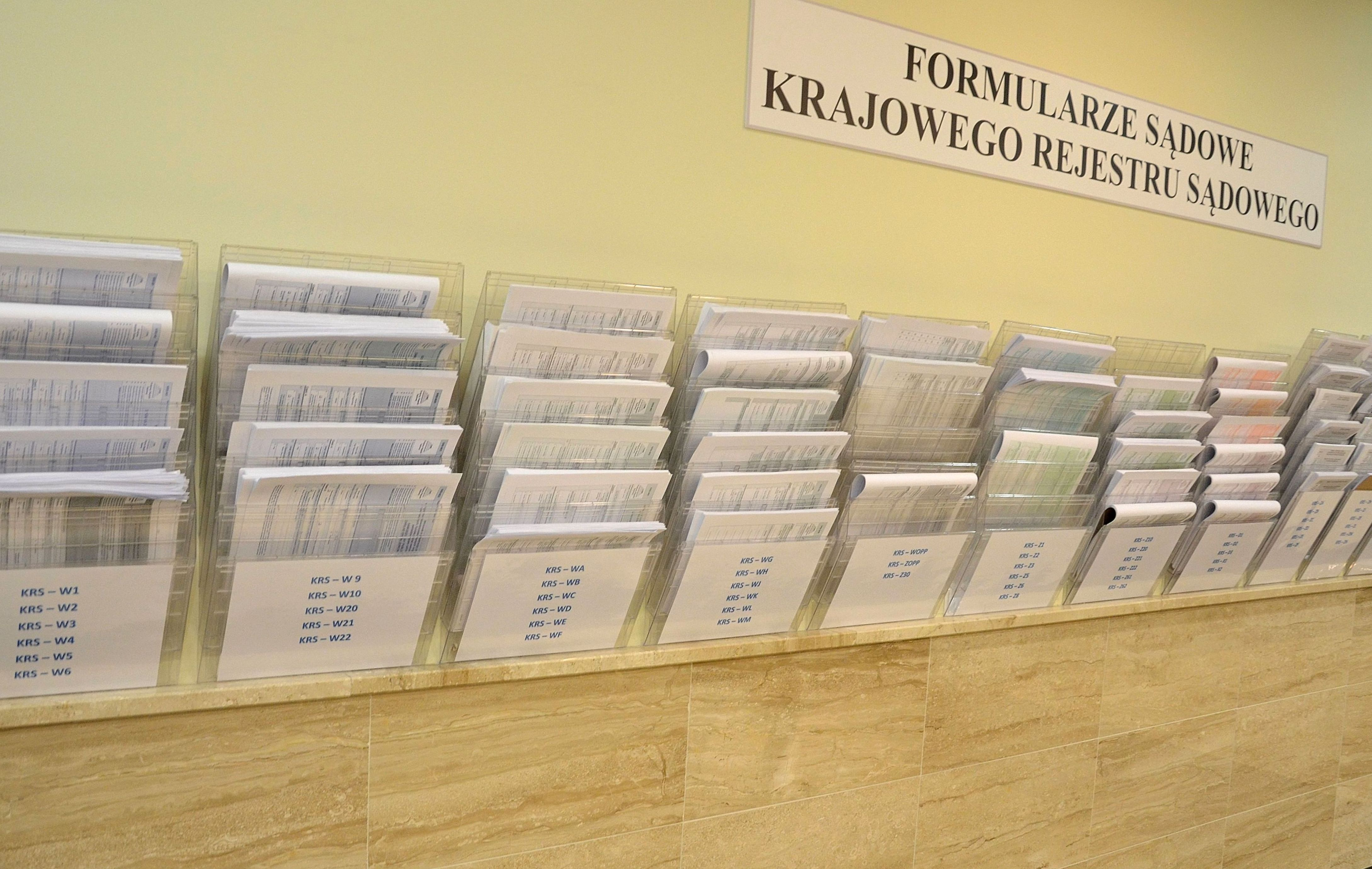 Formularze stosowane w Krajowym Rejestrze Sądowym. Sąd Rejonowy dla m.st. Warszawy w Warszawie